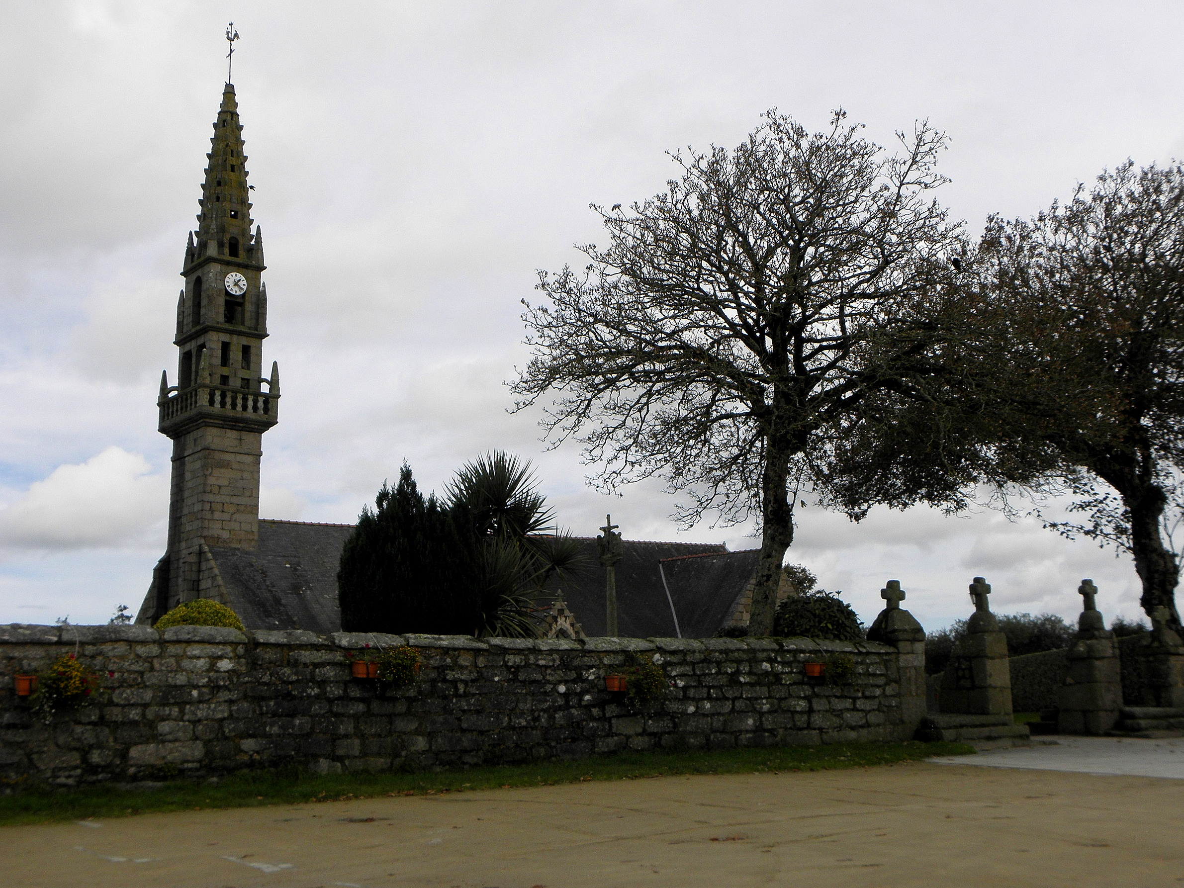 Église Saint-Rivoaré de Lanrivoaré (29). Vue méridionale.